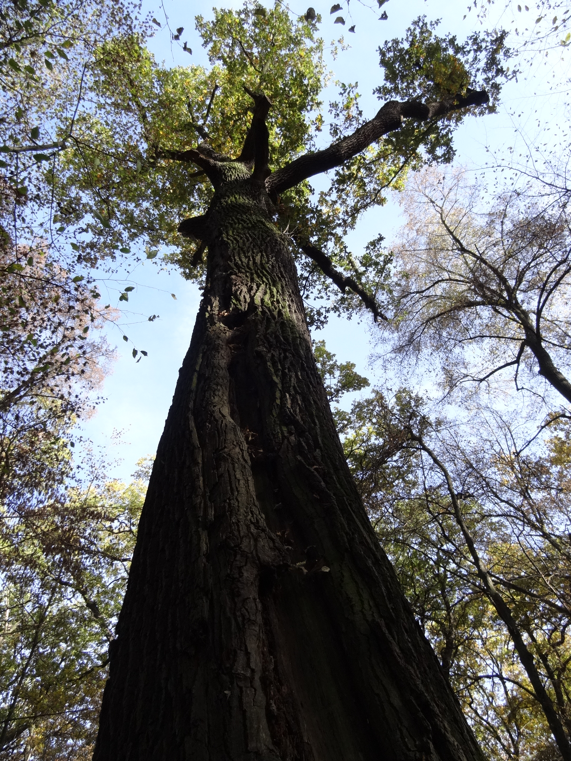 Kunratice - památný dub letní proti Lišovické ulici v Kunratické bažantnici